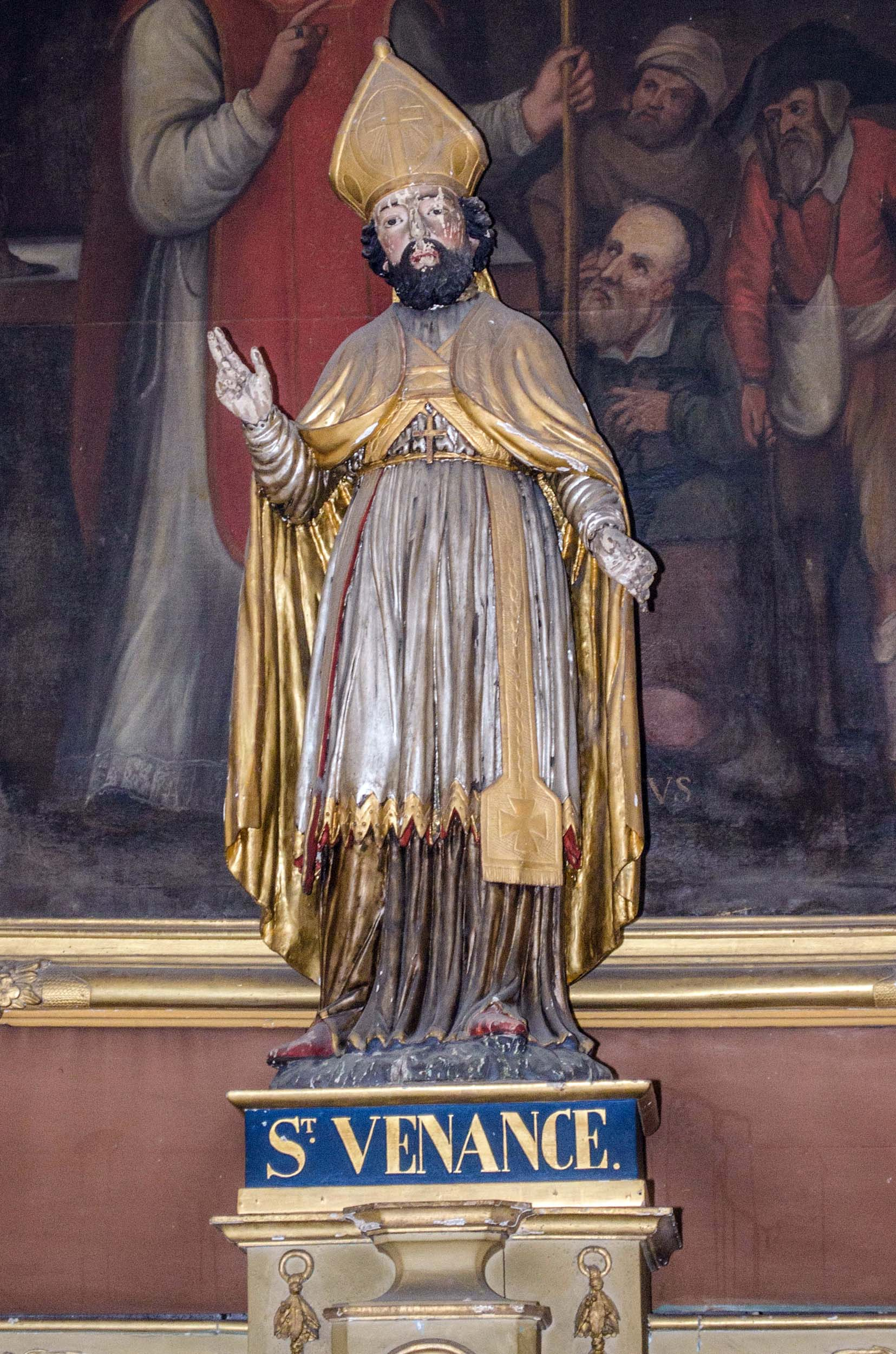 Valence (Drôme), chapelle des Capucins, statue de saint Venance ou Venant de Viviers